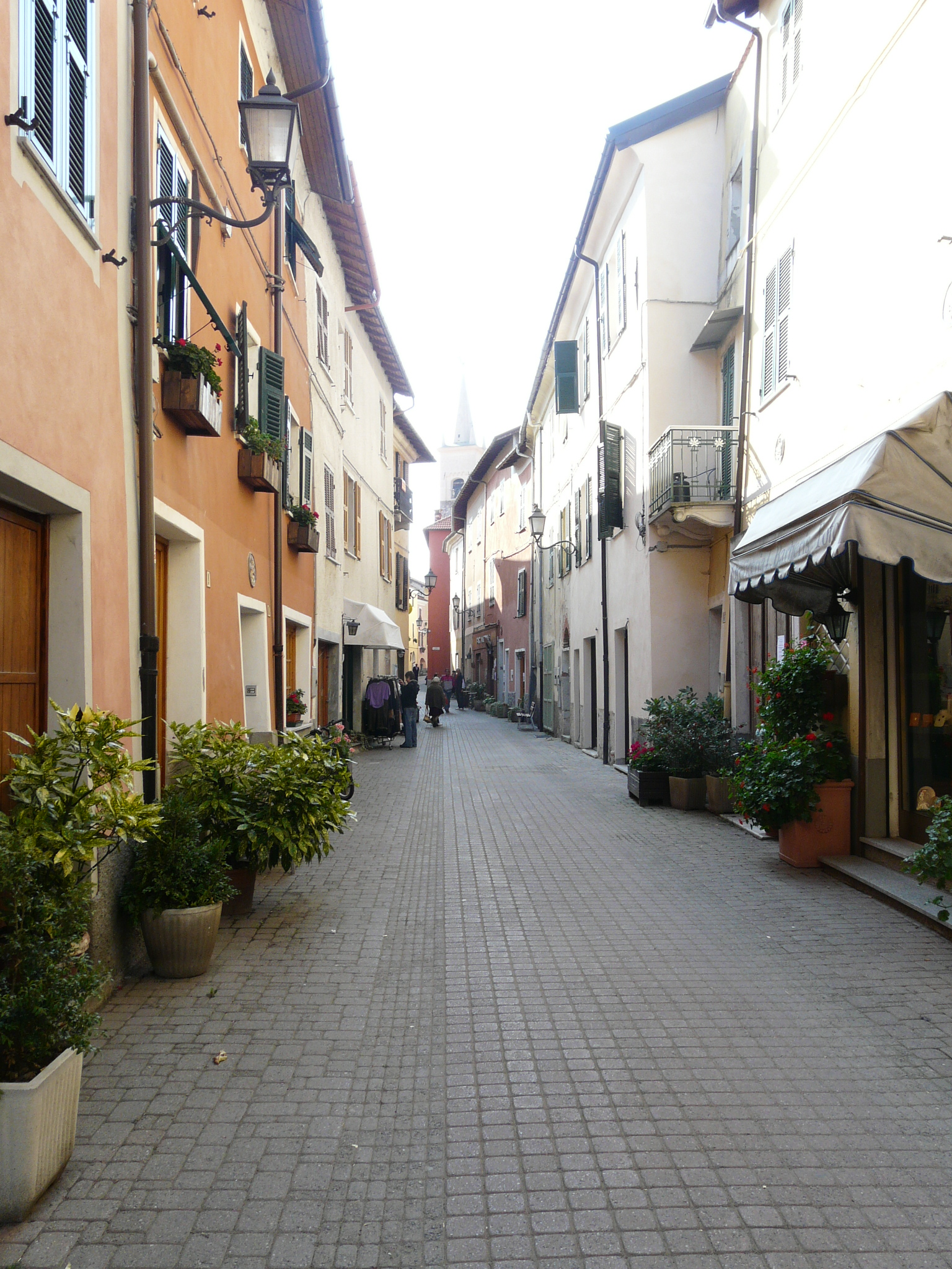 Via del centro storico di Calizzano, Liguria, Italia